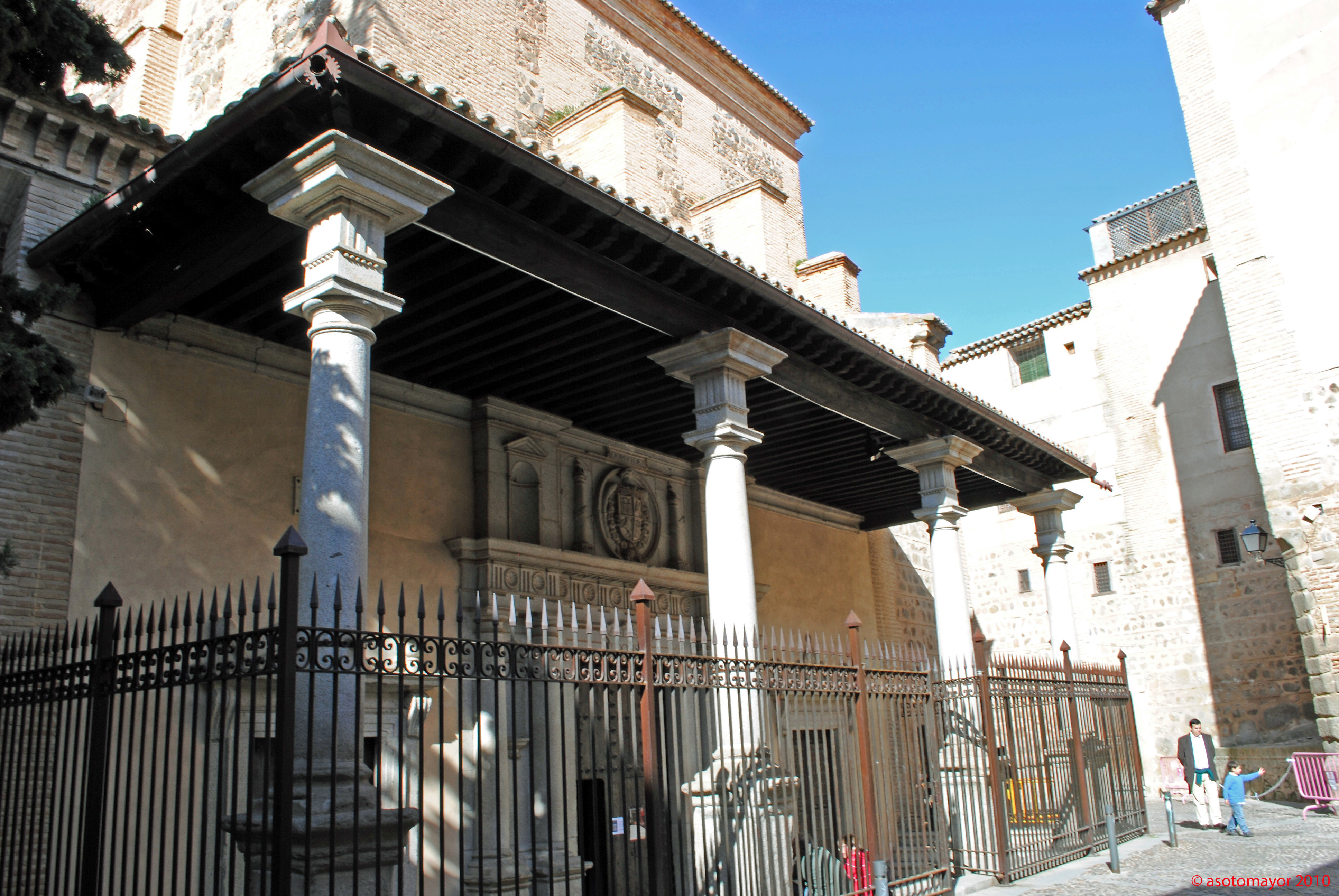 Plaza Santo Domingo El Real